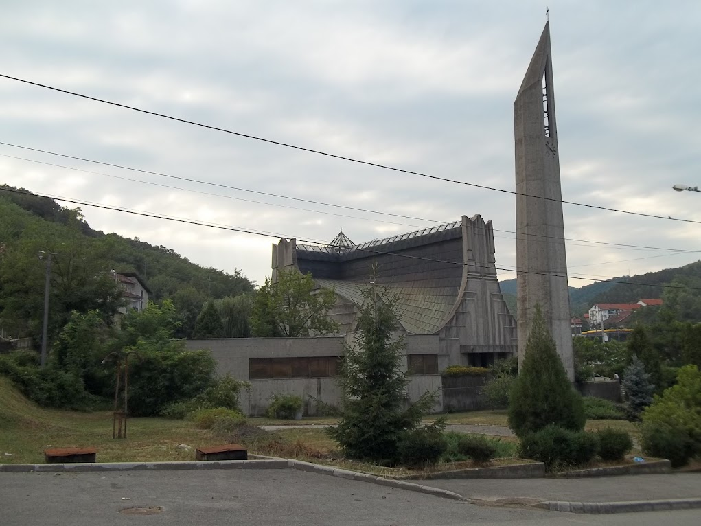 Biserica romano-catolică "Neprihănita Zămislire"